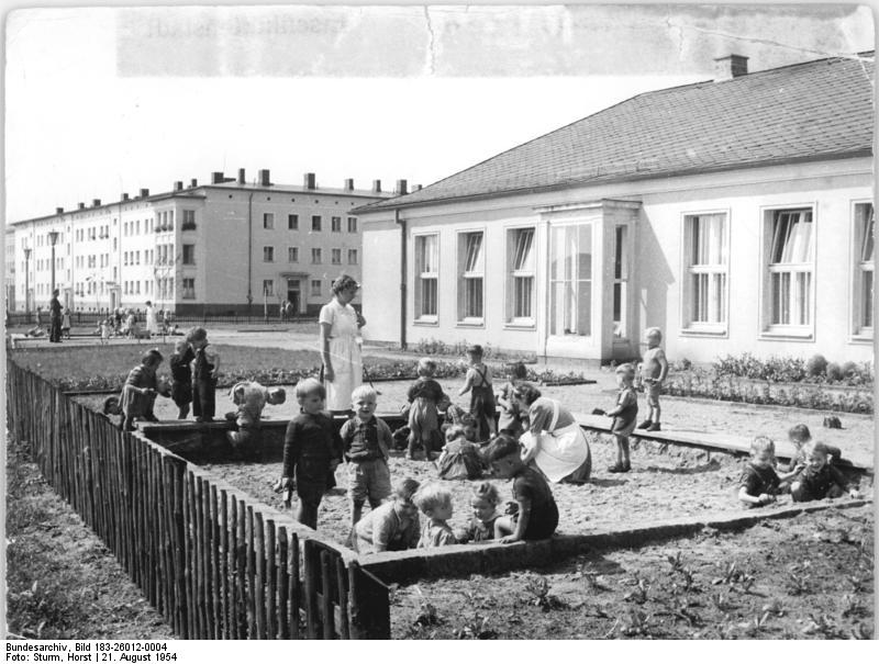 Eisenhüttenstadt, Kindergarten I, Sandkasten Zentralbild Sturm 21.8.1954 Stalinstadt Gleichzeitig mit dem Eisenhüttenkombinat " J.W.Stalin" entstand in unmittelbarer Nähe des Werkes die erste sozialistische Stadt der Deutschen Demokratischen Republik, Stalinstadt Werktätige, die hier in der Nähe ihren Urlaub verbringen, schauen genauso voller Stolz und Bewunderung auf das hier Geleistete, wie die Bevölkerung, die hier eine neue Heimat gefunden hat. In Kürze wird ein Caferestaurant eröffnet werden, ein Teil ist bereits in Betrieb, das sich mit den Restaurants "Warschau" und " Budapest" in Berlin messen kann. UBz: Blick auf den Kindergarten I von Stalinstadt.